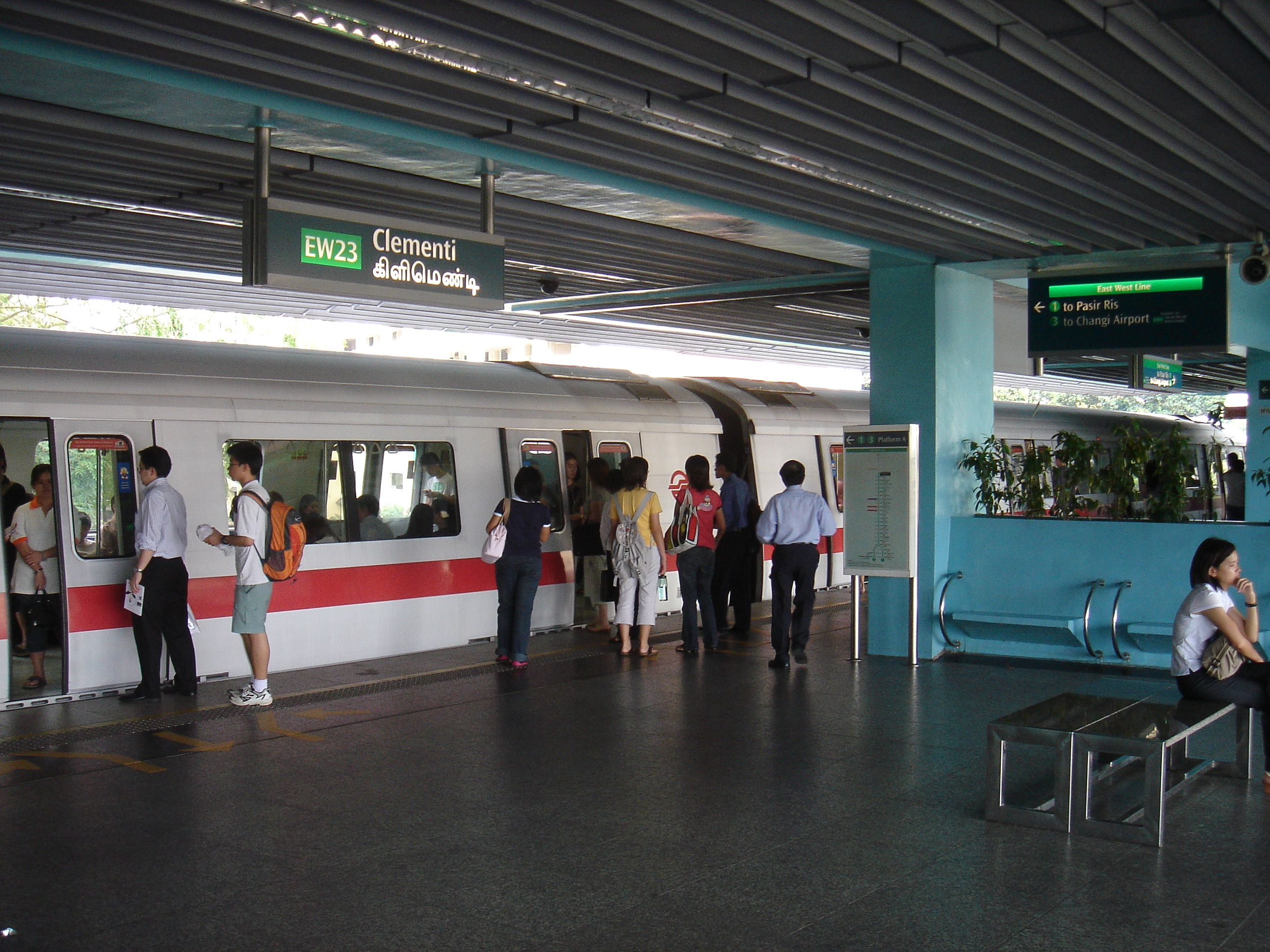 Clementi MRT Station, platform level, Clementi, Singapore.